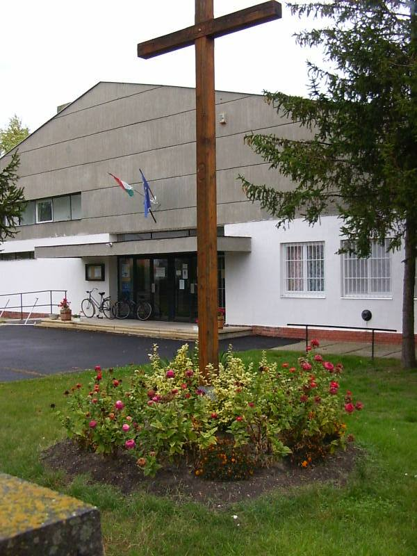 Milleniumi kereszt, háttérben a művelődési ház bejárata (Rétalap, Magyarország)